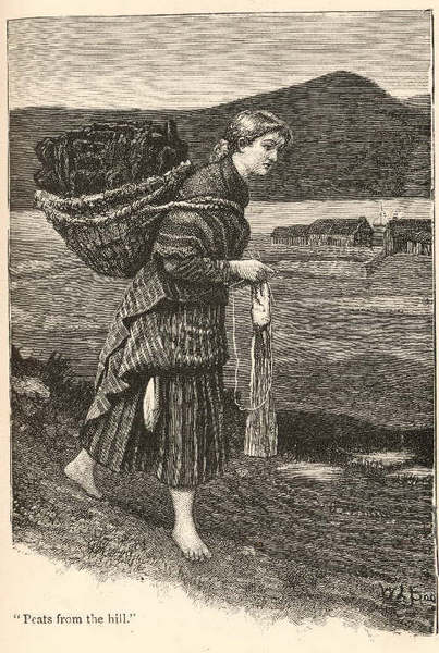 woman walking and knitting. From the book Britta: A Story of Life in the Shetland Isles by George Temple, 1886.